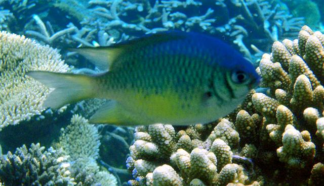 Amblyglyphidodon indicus